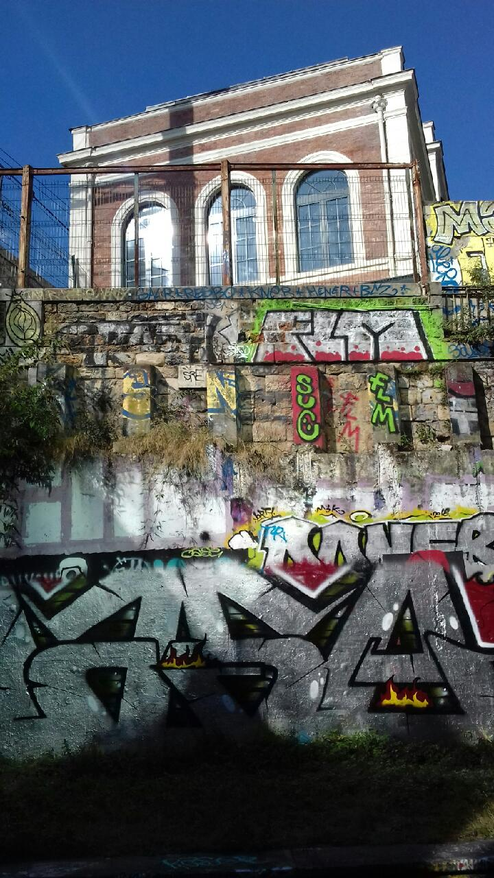 Ancienne gare de chemin de fer Ouest-Ceinture (Paris 14e).